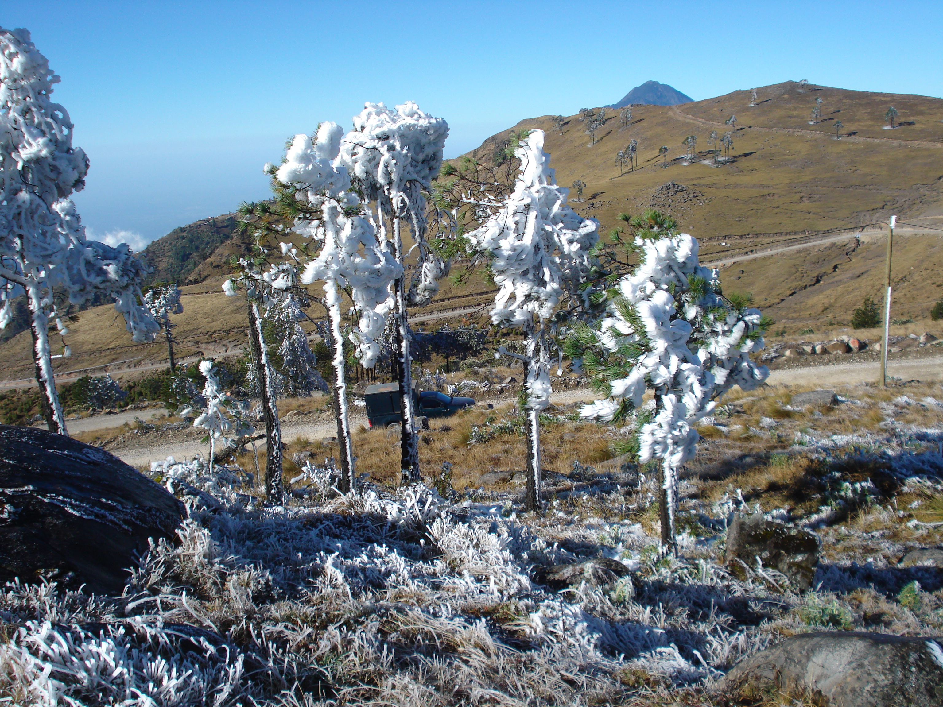 Cerro del Qo'Tzik, bajo la cual se asienta el municipio de Ixchiguán.